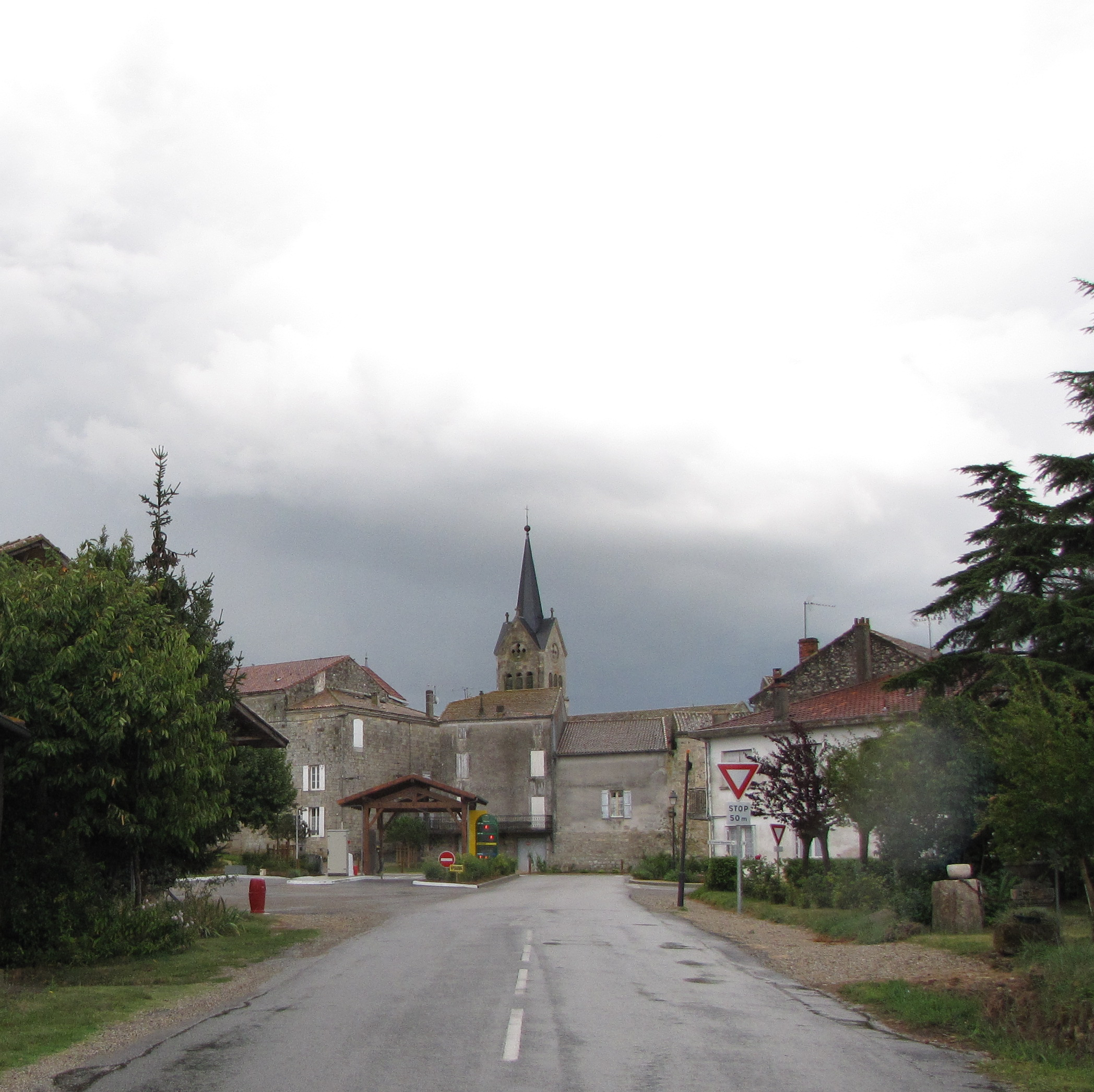 Prayssas